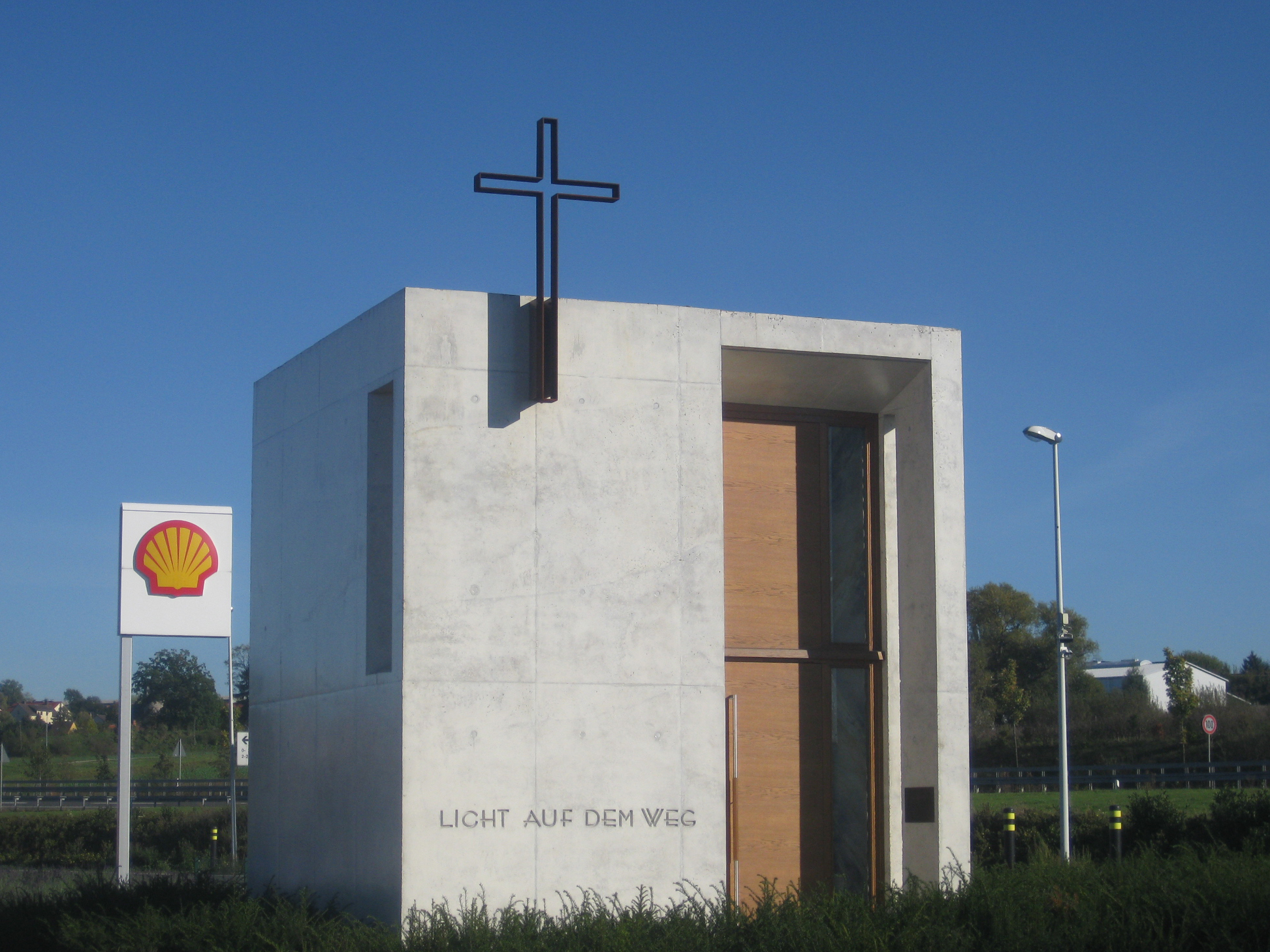 Autobahnkapelle "Licht auf dem Weg" auf dem Rasthof "Lohfeldener Rüssel"